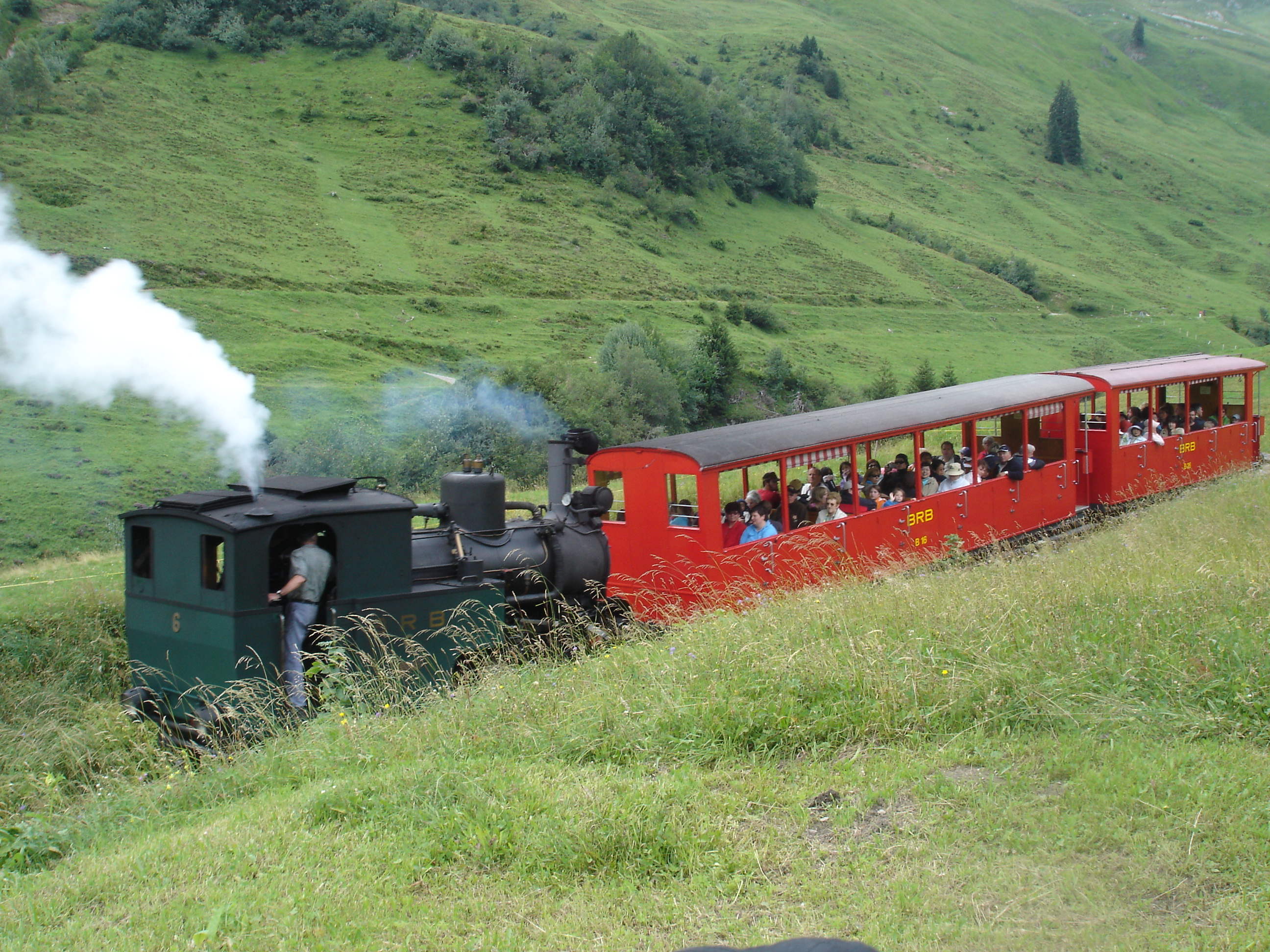 Brienzer Rothorn Bahn Talfahrt Lok Nr. 6